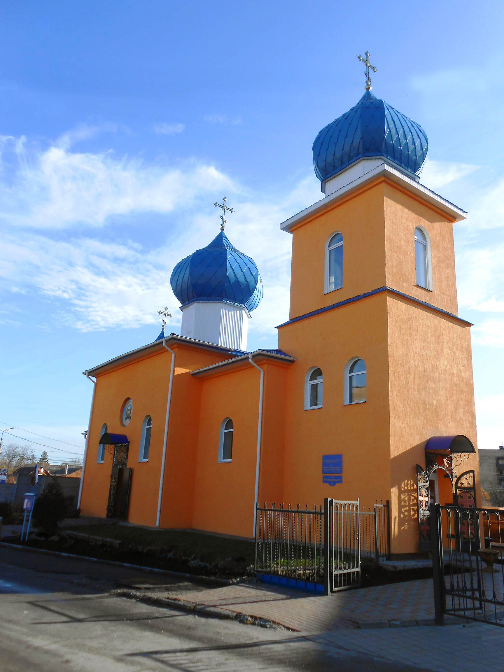 Кафедральний собор «Спас на Убрусі»